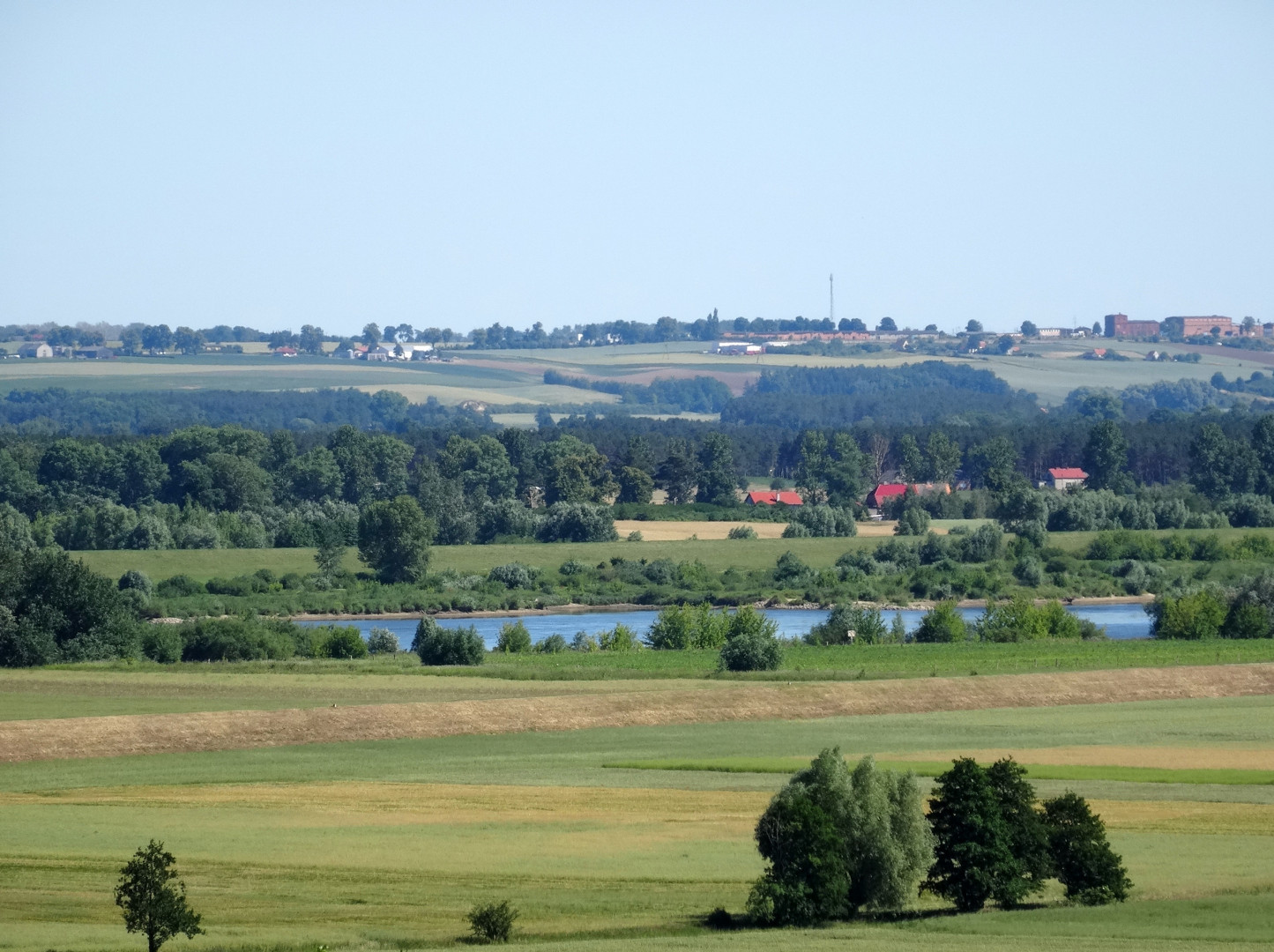 Widok z grodziska Talerzyk koło Topolna na Dolinę Dolnej Wisły